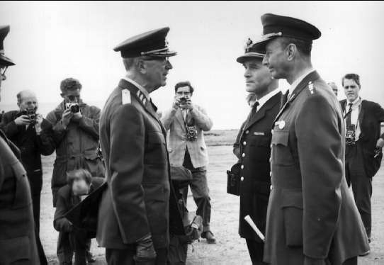 Kungabesök år 1962. Gustav VI Adolf samtalar med Nils Hansson och överste Ingemar Bratt.